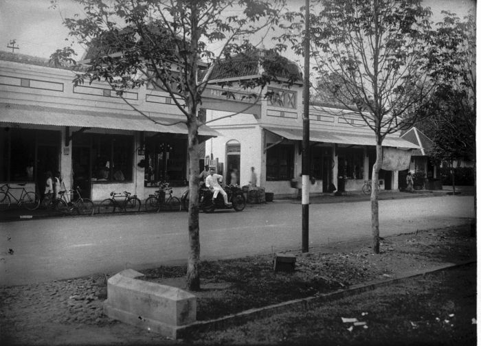 Foto. Winkels bij de Pasar Klodjen te Malang.